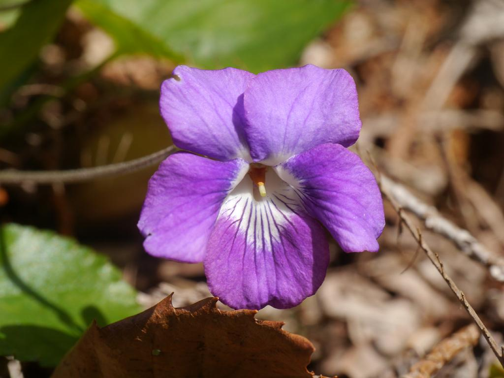 Viola obtusa：ニオイタチツボスミレ 2016/03/22 和歌山県田辺市：Tanabe City. Wakayama Pref. Japan